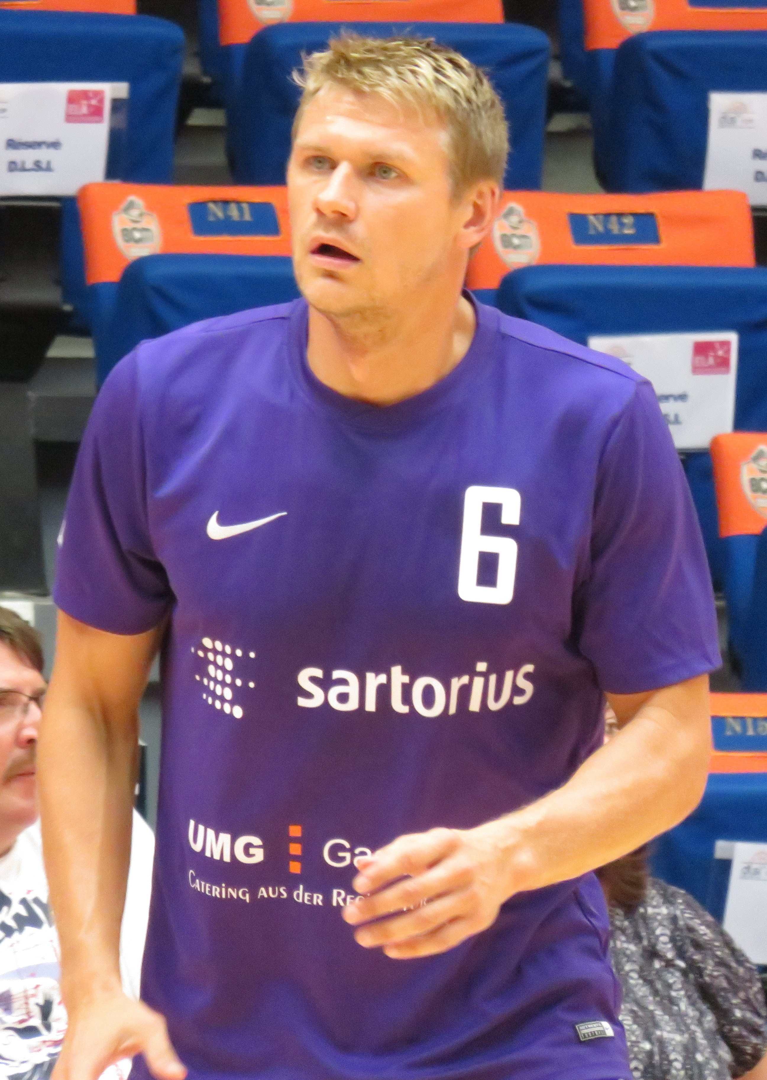 6 Benas Veikalas